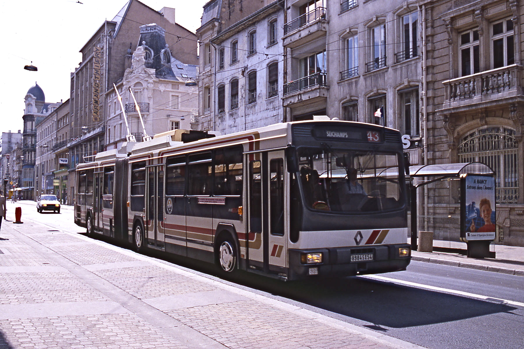 Le trolleybus PER 180H n°629, affecté à la ligne 3/43, circulant rue Saint-Georges à Nancy en 1986.